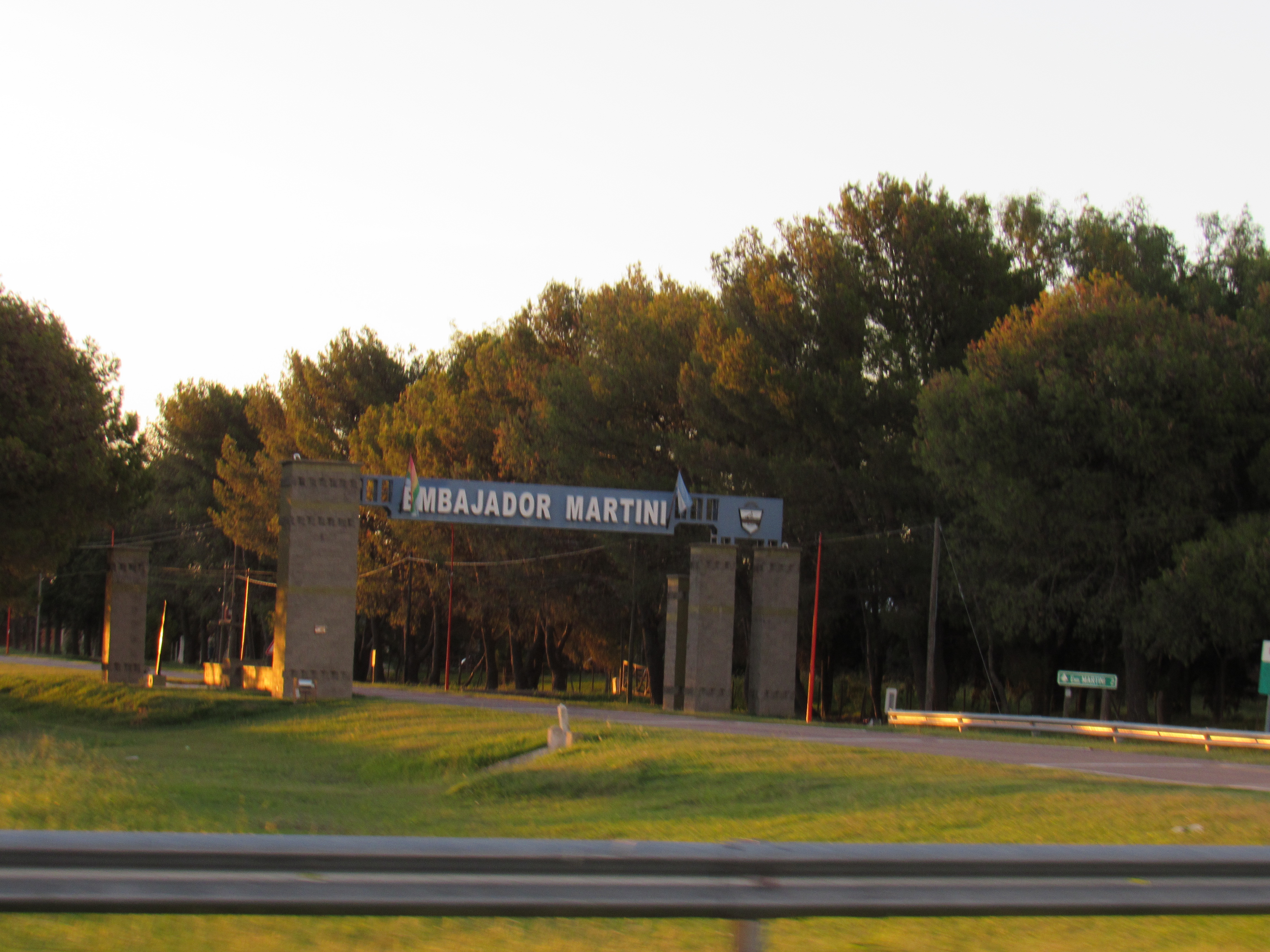 Embajador Martini desde la Ruta Nacional 35